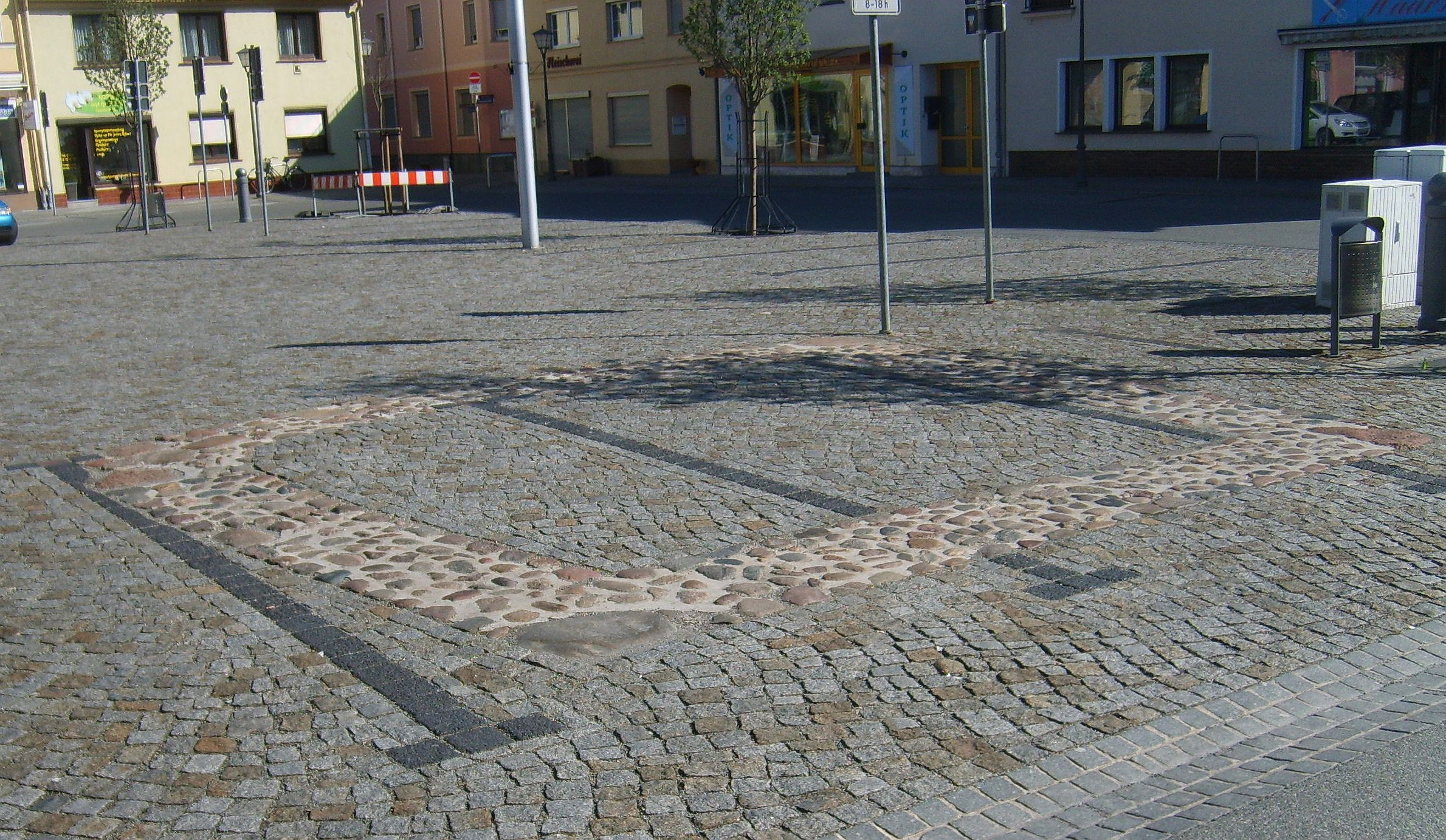 Fundamentkennzeichnung eines sich ehemals auf dem heutigen Gelände des Marktes befindlichen Gebäudes in Elsterwerda.